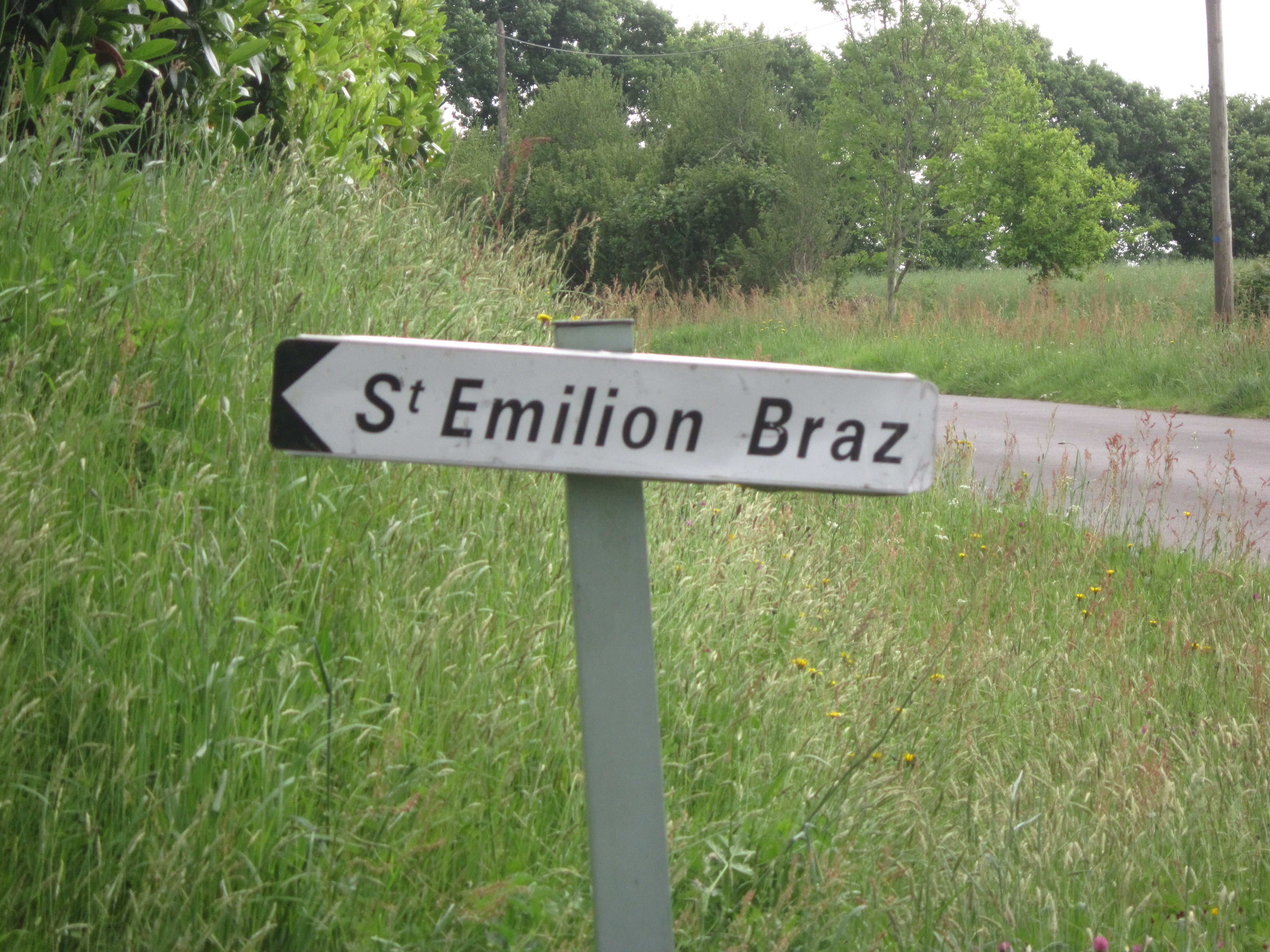 Motreff : panneau à l'entrée du chemin menant au hameau de Saint-Émilion.